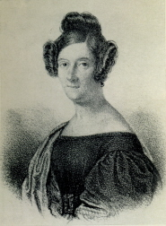 Angela Veronese (1778 – 1847)